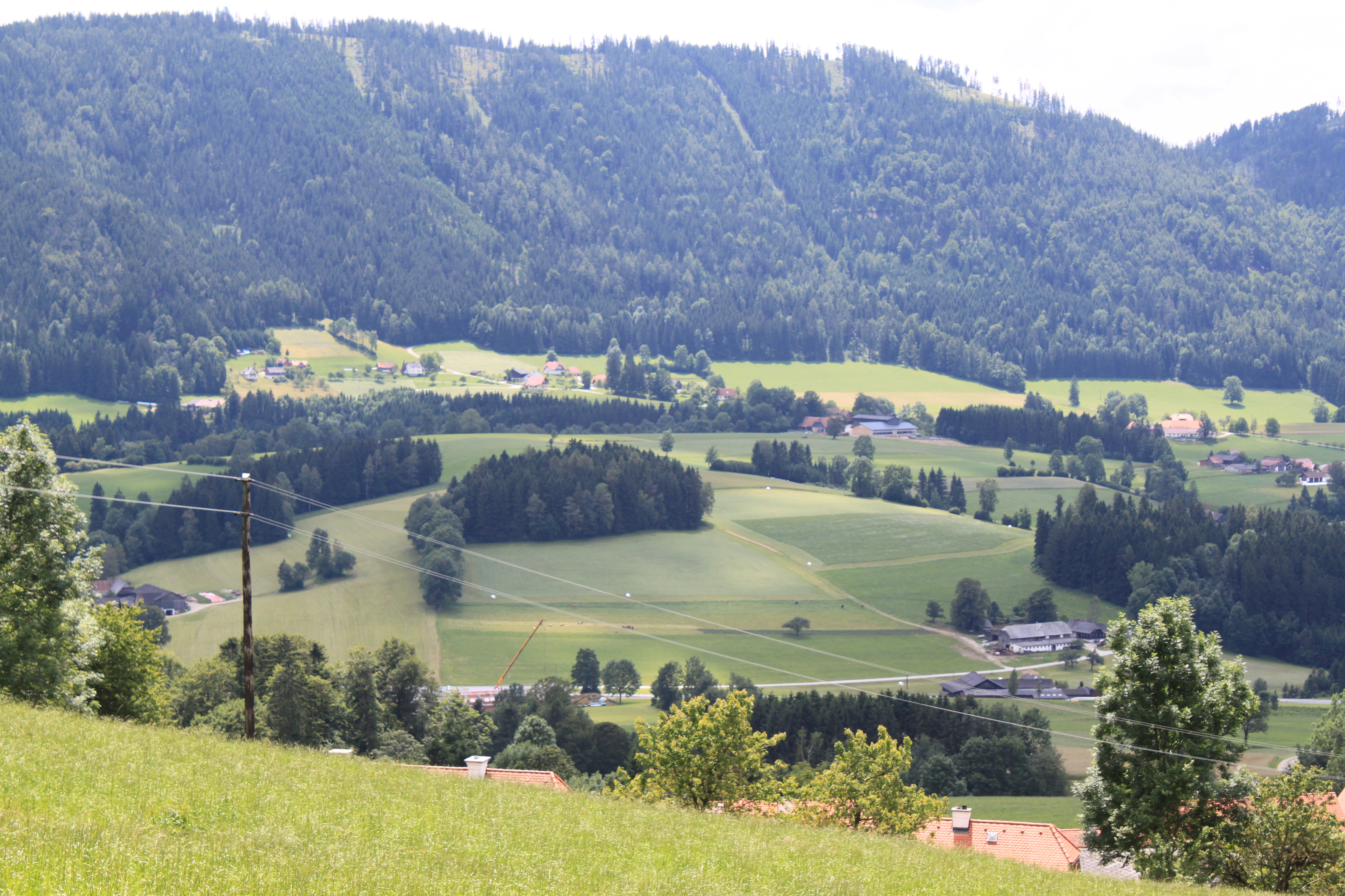 Haufenreith in der Gemeinde Hohenau an der Raab, im Hintergrund der Wolfsattel. Das Foto wurde von Krammersdorf aus gemacht.